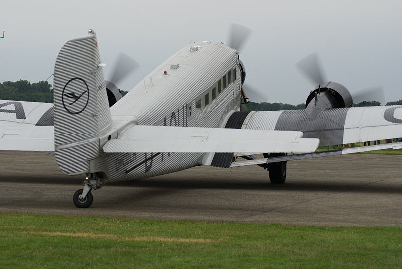 Ju52